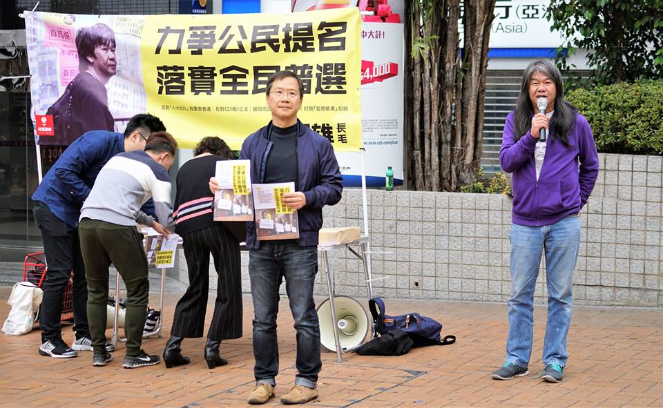 中文（香港）: 香港社民連立法會議員梁國雄(右一)擺街站爭取公民提名。